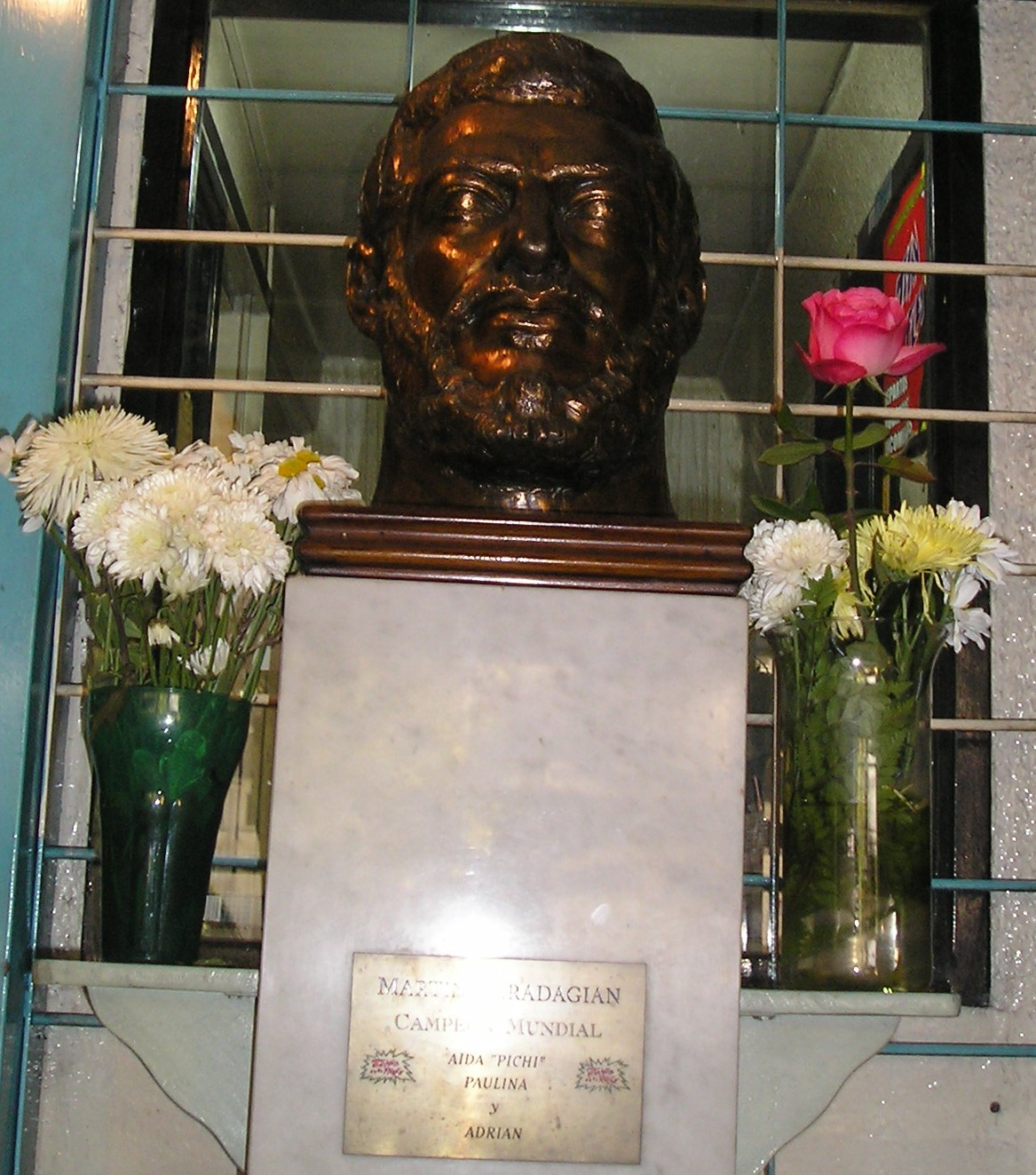 Busto de Martín Karadagián, ubicado en la calle Pacheco de Melo entre Junín y Uriburu.